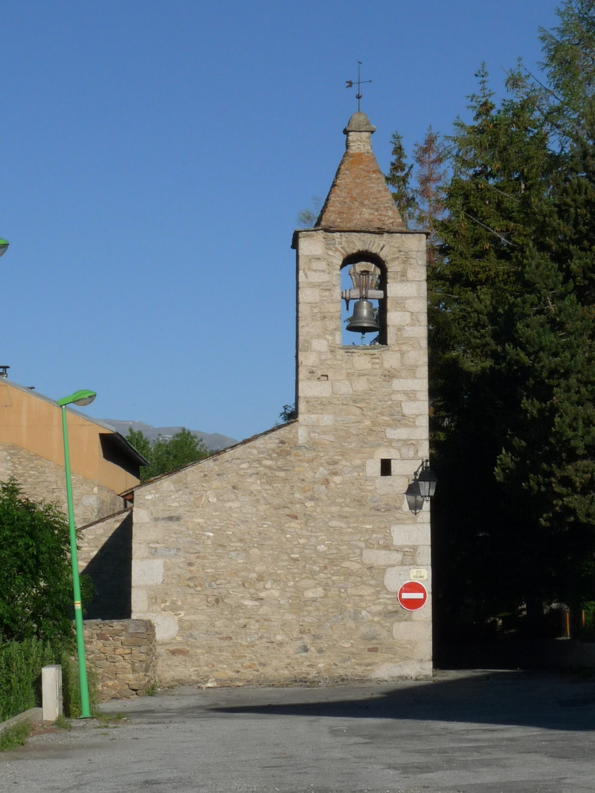 Eglise de Targassonne, Pyrénées-Orientales, France